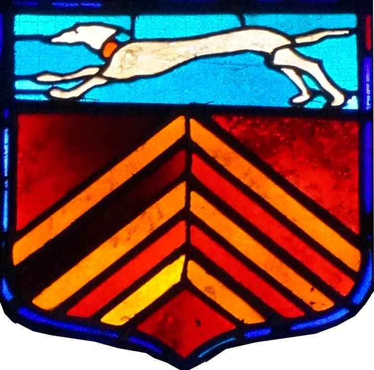 à l'église de Fontenoy-sur-Moselle.